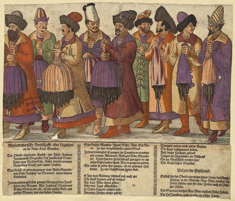 Titel: Warhafftige Contrafactur der Legation oder Gesandten des Gross Fürsten auss Moscaw ... an die Römische Kayserliche Majestat .. Urheber: Donat Hübschmann, Maler, Formschneider, ca. 1525/30 - 1583 Weitere Titelinformationen: [Donat Hübschmann ?] Ort, Verlag: Gedruckt zu Prag : durch Michael Petterle Druckort: Praha Erscheinungsdatum: [1576] Format: 1 Einblattdruck : kolorierter Holzschnitt ; Teilbilder à ca. 23,5 x 37 cm Sprache: Deutsch Beschreibung: Bild zerschnitten und auf 3 Blättern montiert, Überschrift ausgeschnitten und auf einem vierten Blatt montiert ; Aus der Sammlung von Johann Jakob Wick (herausgelöst aus Ms F 25, 246 bis F 25, 249) ; Gruppenporträt einer russischen Gesandtschaft von Zar Ivan IV. an Kaiser Maximilian II., anlässlich des Reichstags in Regensburg 1576, mit dem Beglaubigungsschreiben und Geschenken an der zweiten Audienz vom 18. Juli